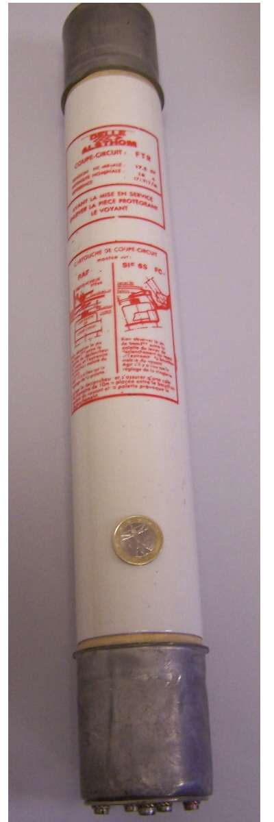 photo perso P.Loos